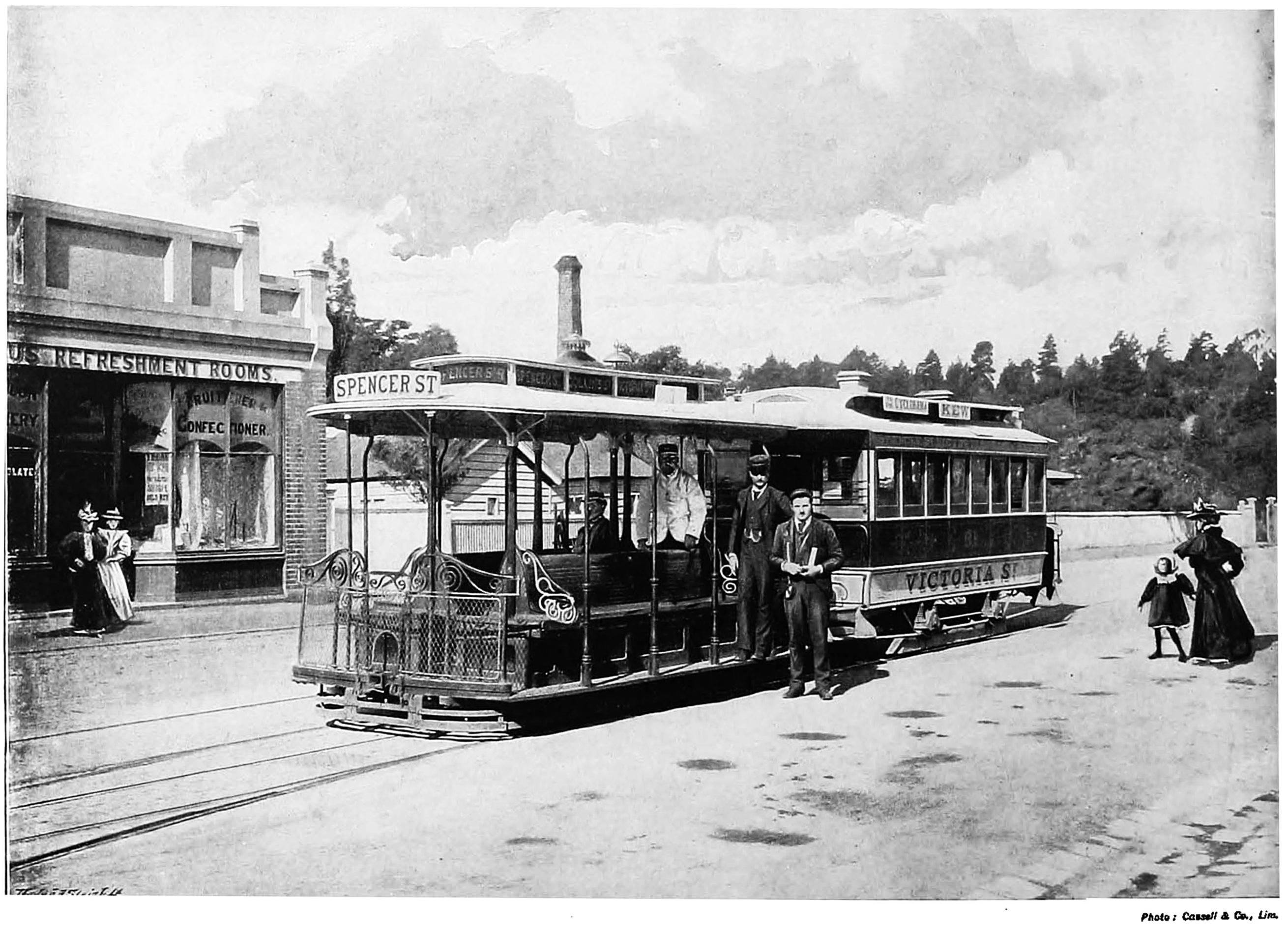 Cable car, Melbourne